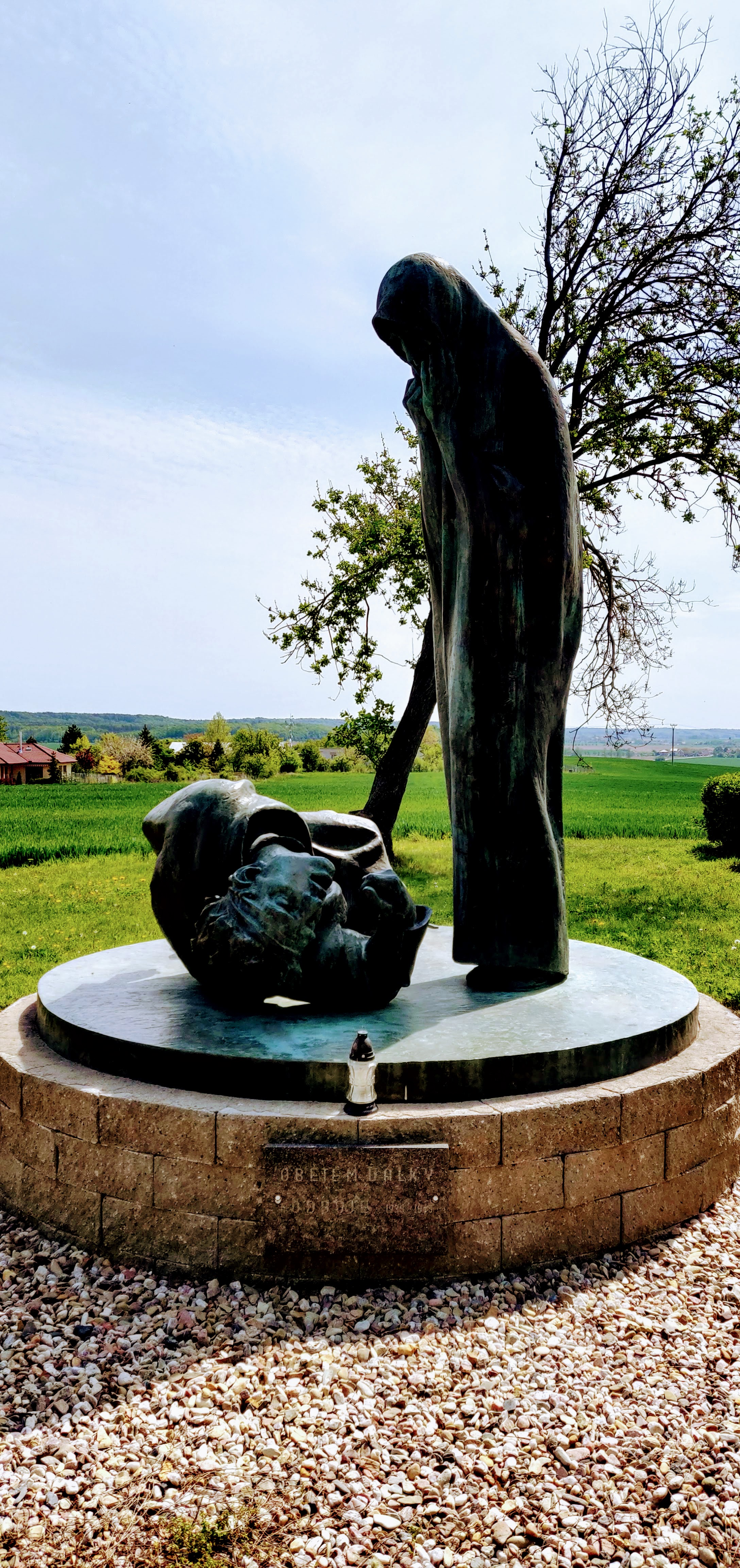 Pomník se nachází u vstupu na hřbitov v Holicích